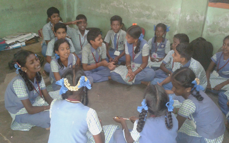 வகுப்பு அறையில் விவாதம் மாணவர்கள் விவாதம்